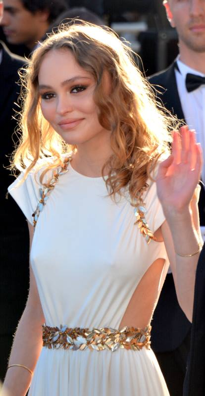 Lily-Rose Depp au festival de Cannes